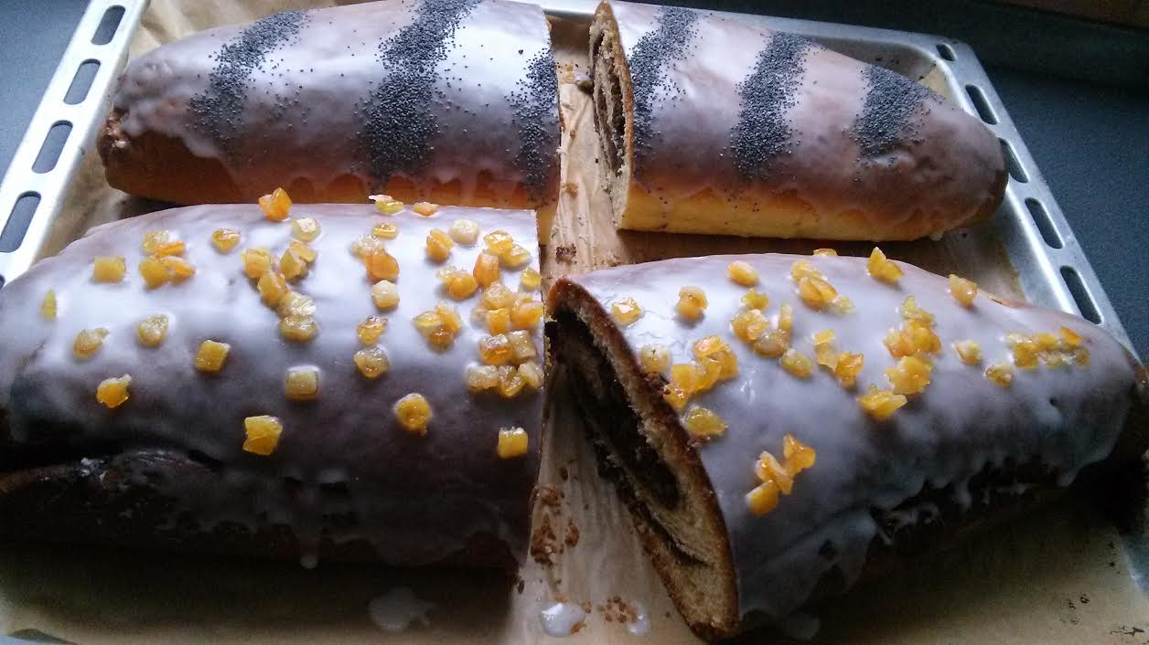 Makowce Natalii